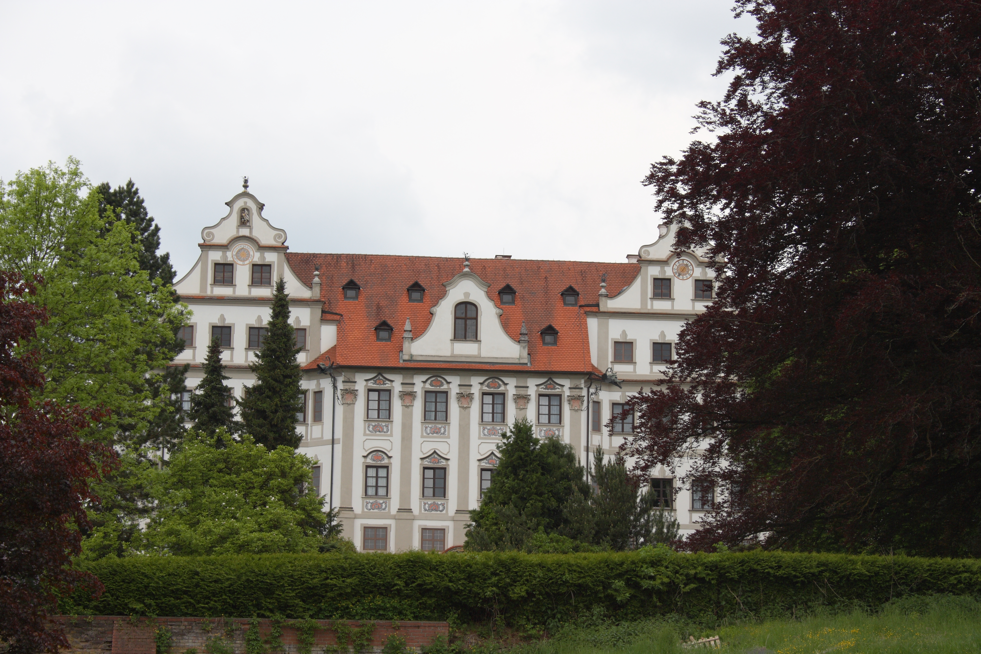 Schloss in Harthausen, einem Ortsteil von Rettenbach im Landkreis Günzburg (Bayern)